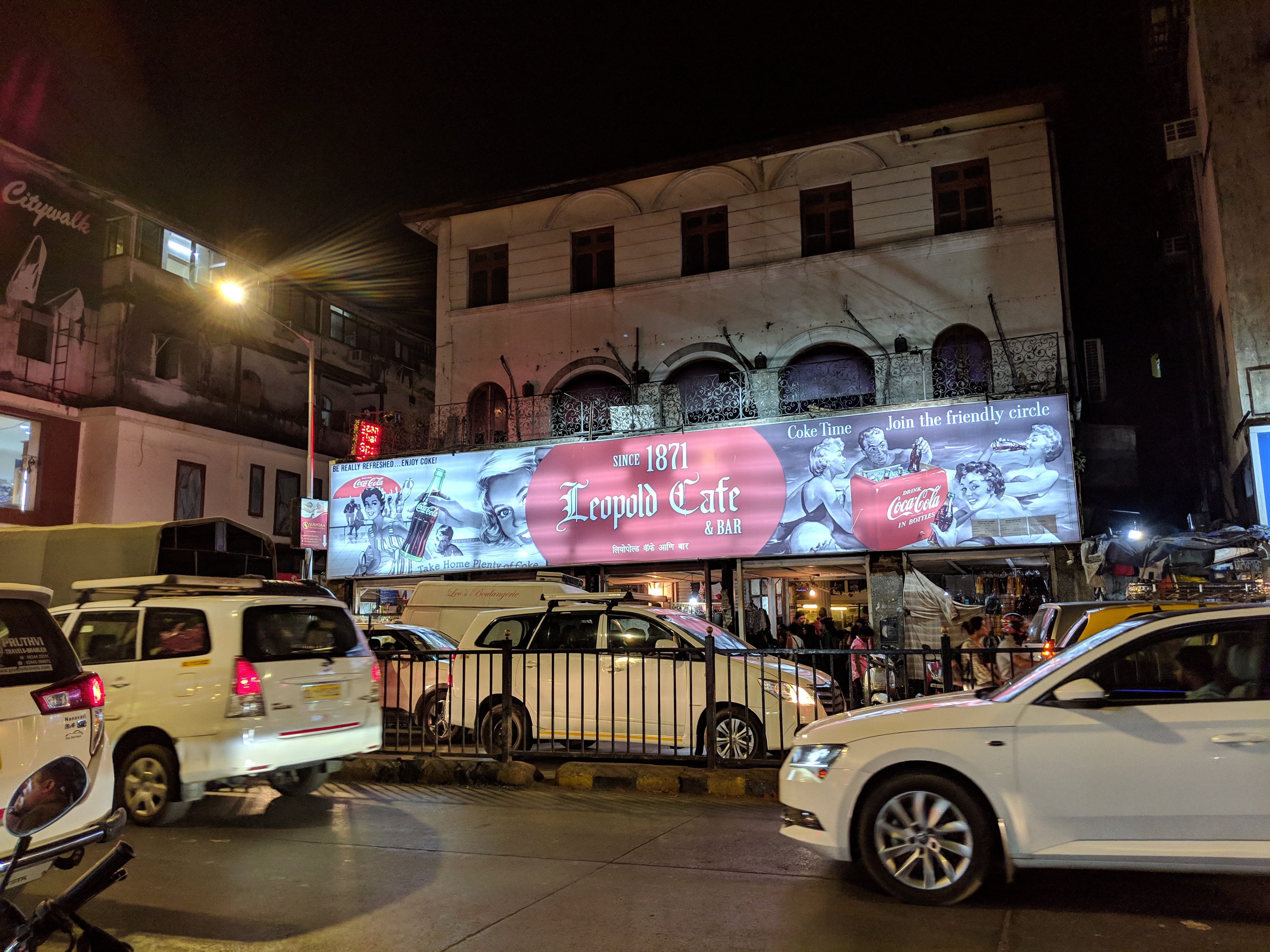 کوردی: لیۆپۆلد کافێ لە مومبای، ئەو کافێیەی لەساڵی ٢٠٠٨ هێرشێکی تیرۆریستی کرایە سەر. کافێیەکە لەئێستاشدا سەردانیکەری زۆری هەیە و لەسالی ١٨٧١ کراوەتەوە